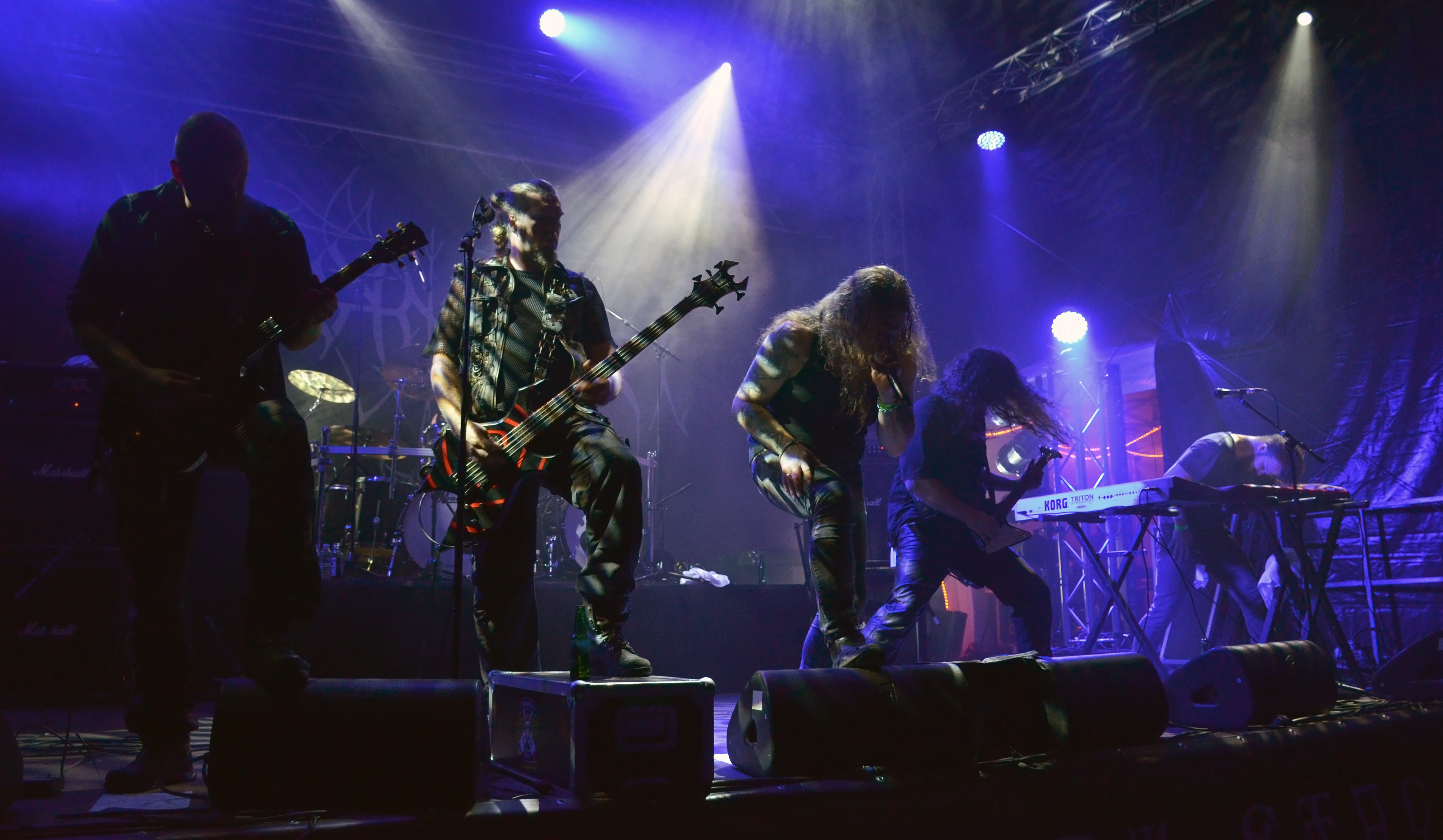 Borknagar au Fall of Summer Festival, à Torcy, le 5 Septembre 2014.